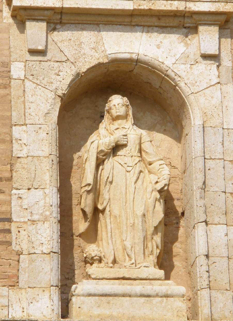 Autillo de Campos (Palencia) - Iglesia de Santa Eufemia